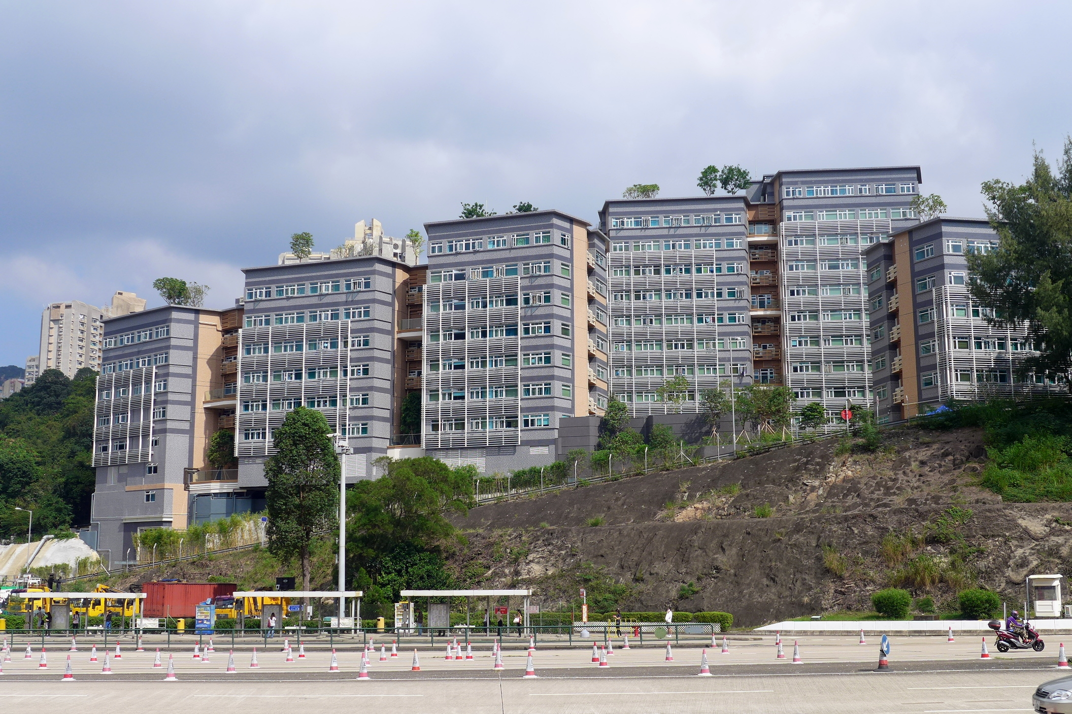 Hang Seng Management College Student Hostel